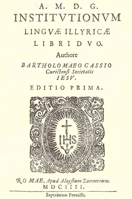 Naslovnica prvog izdanja prve hrvatske gramatike iz 1604.